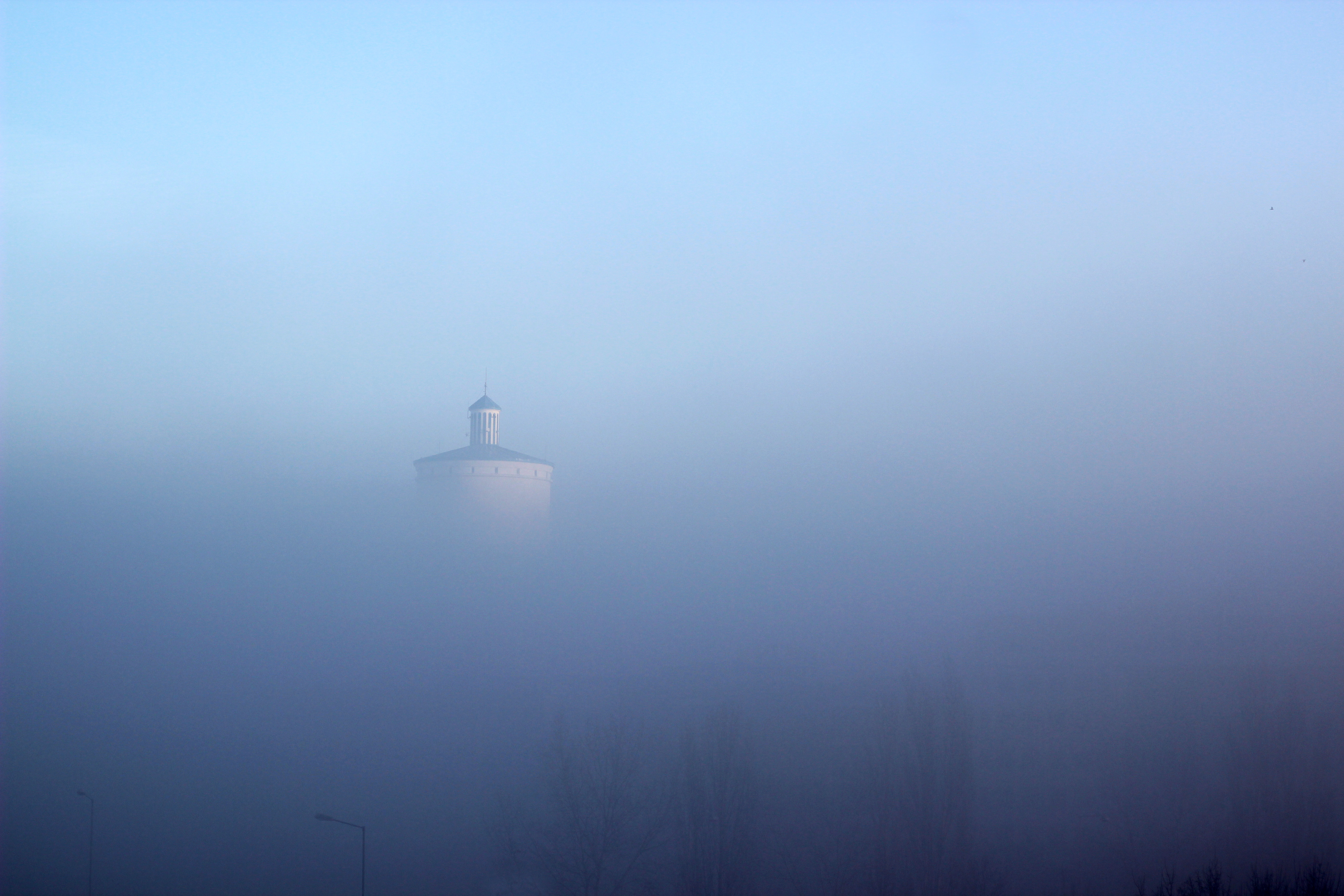 Belušov vodojem v Trnave v hmle